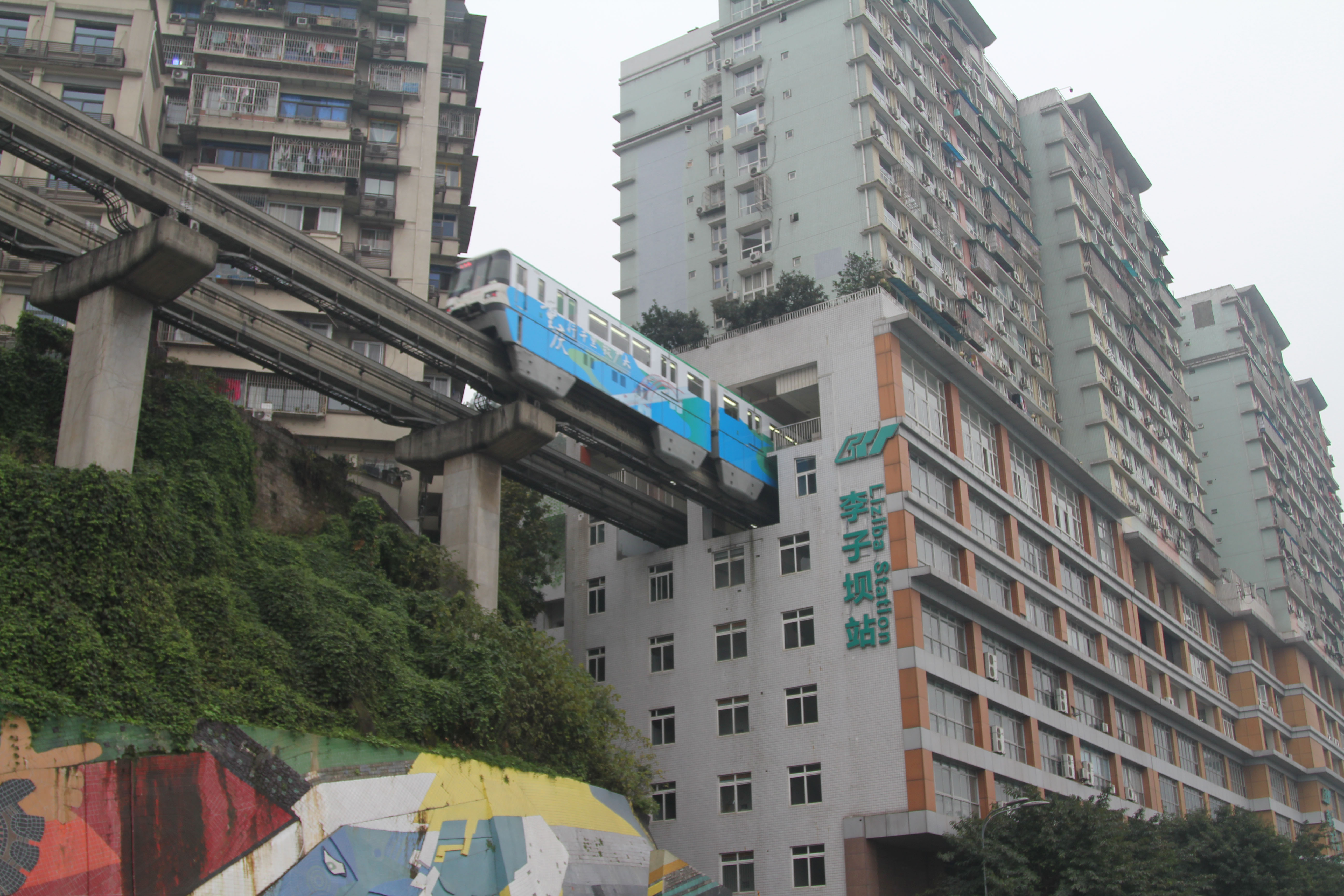 中文（中国大陆）: 2号线列车穿过李子坝站